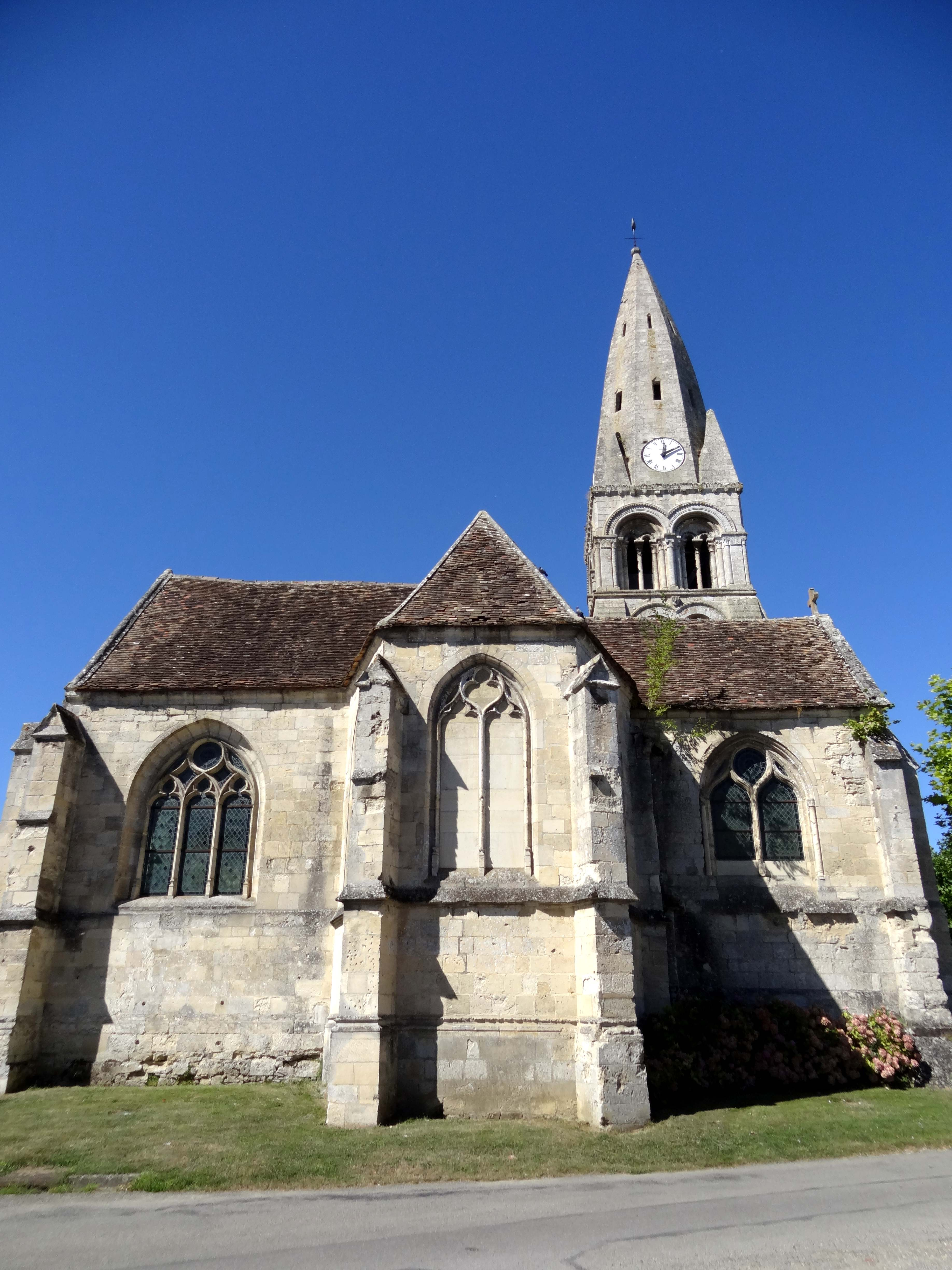 Église Sainte-Geneviève de Marolles - voir titre.